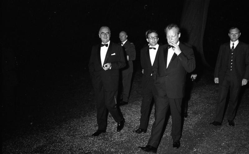 Brandt gibt Abendessen für Pompidou auf Schloß Gymnich